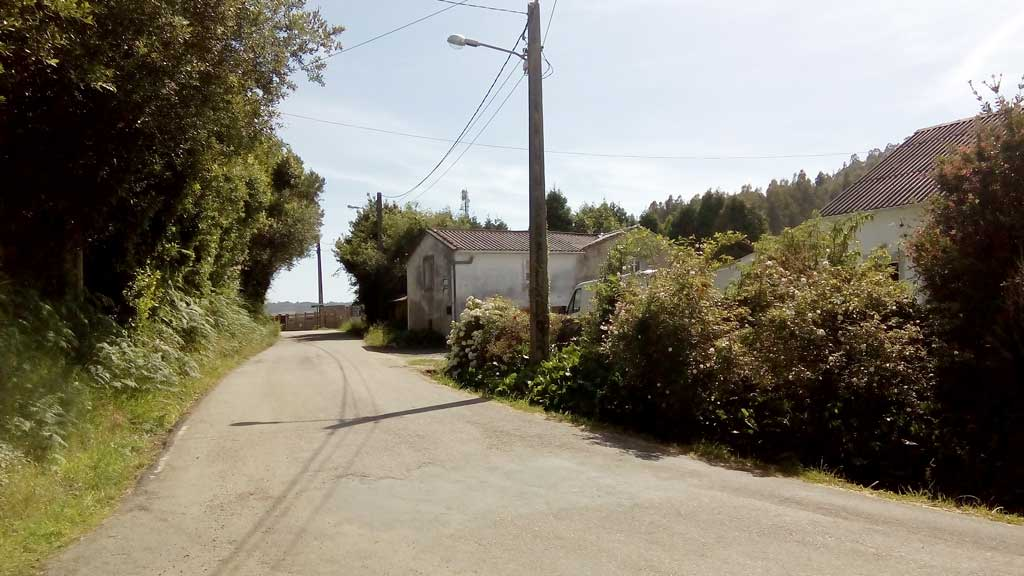 Vista de Caaveiro, Narón.